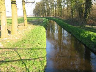 Zelfgemaakte foto